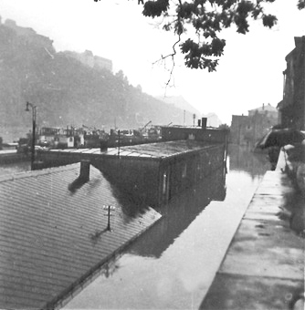 Donau Hafenhalen zu Passau bei der Joerhonnert-Iwwerschwemmung 1954